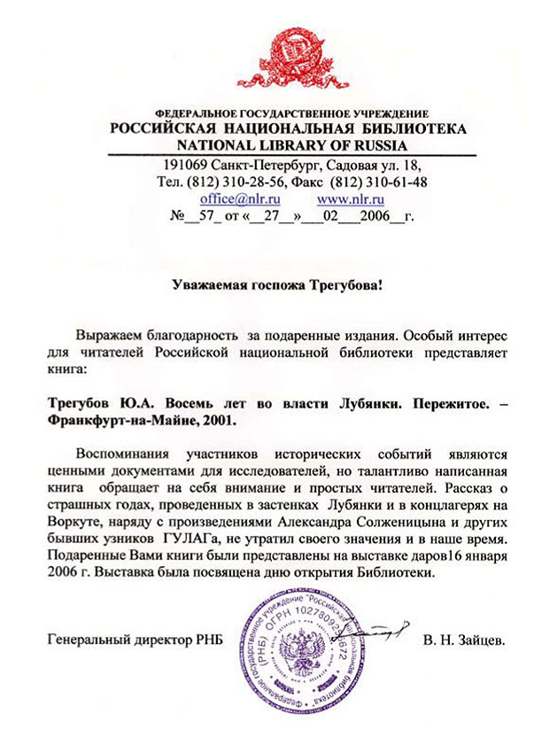 letter of the direkter of the russian national library accepting Jurij A. Treguboffs work as russion history. German Translation: “Erinnerungen von Zeitzeugen historischer Ereignisse sind wertvolle Dokumente für die Forschung. Das talentiert geschriebene Buch zieht jedoch auch die Aufmerksamkeit anderer Leser auf sich. Dieser Bericht über die furchtbaren Jahre, zugebracht hinter den Mauern der Lubjanka und in den Konzentrationslagern von Workuta, sowie die Erzählungen von Alexander Solschenizyn und anderer Häftlinge des GULAG haben auch in unserer Zeit nichts von ihrer Bedeutung verloren.”